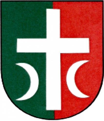 znak, Uhřínov, okres Žďár nad Sázavou